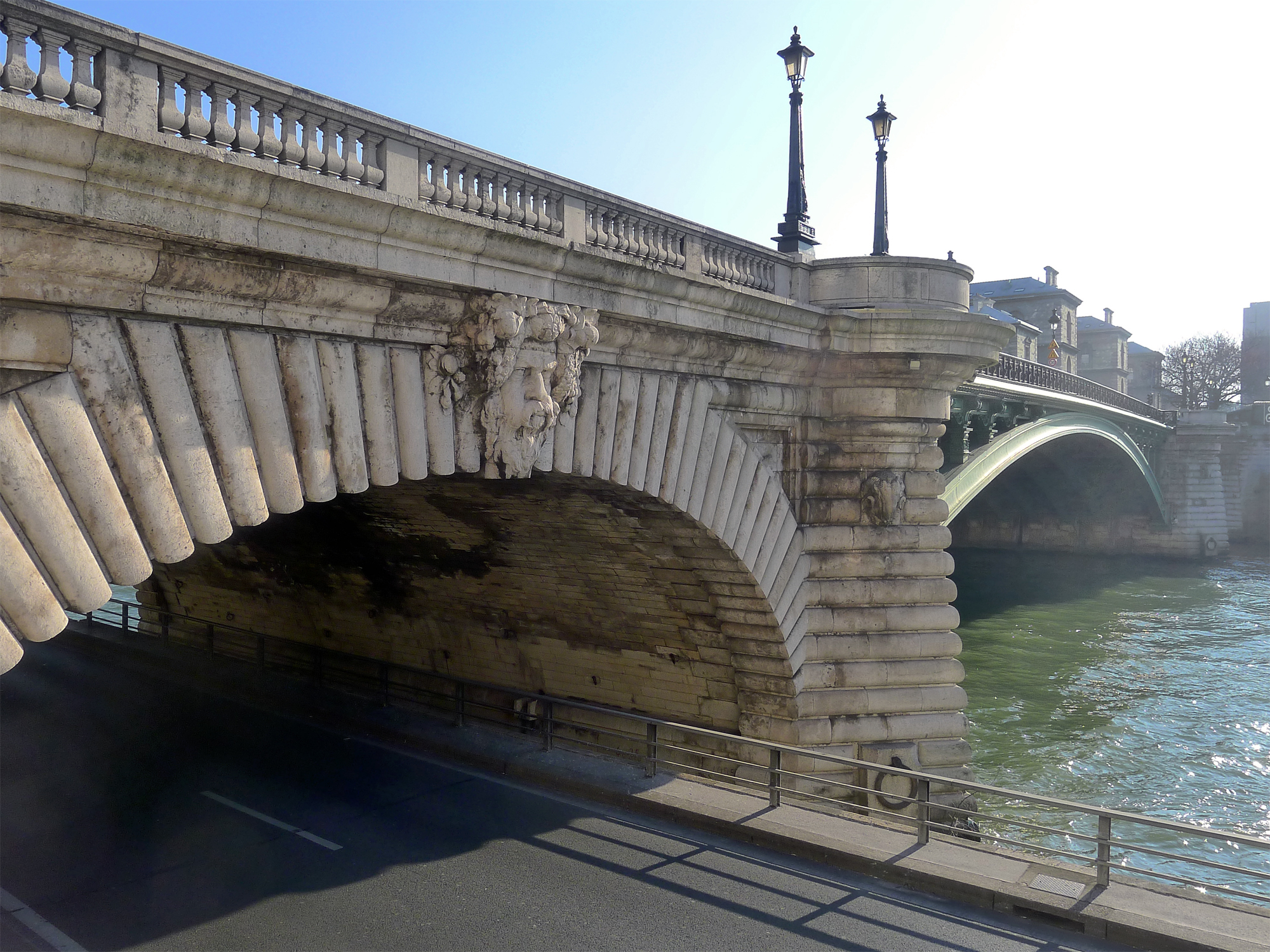 Pont Notre-Dame - Paris IV